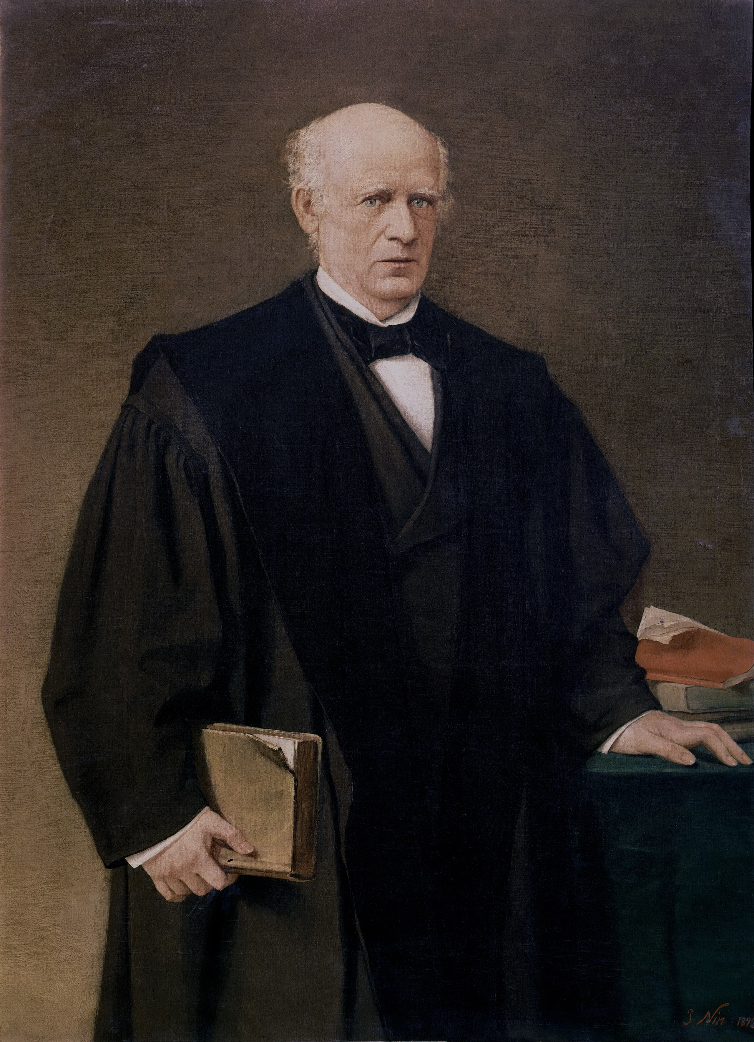 Pascual Madoz, óleo sobre lienzo, 130 x 95 cm.